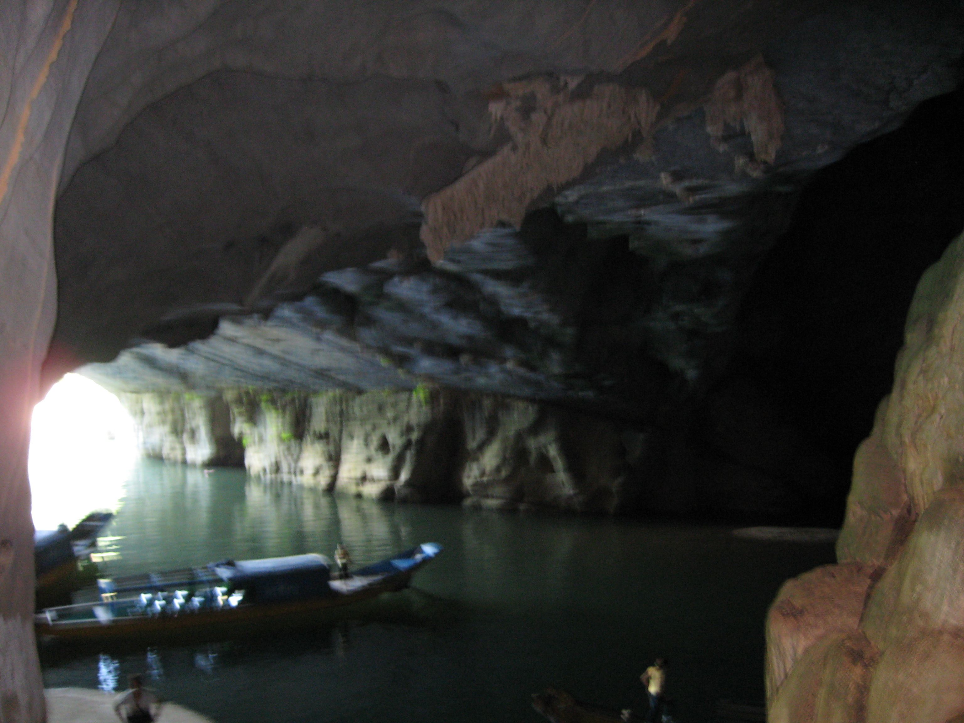 Phong Nha-Ke Bang National Park in Vietnam